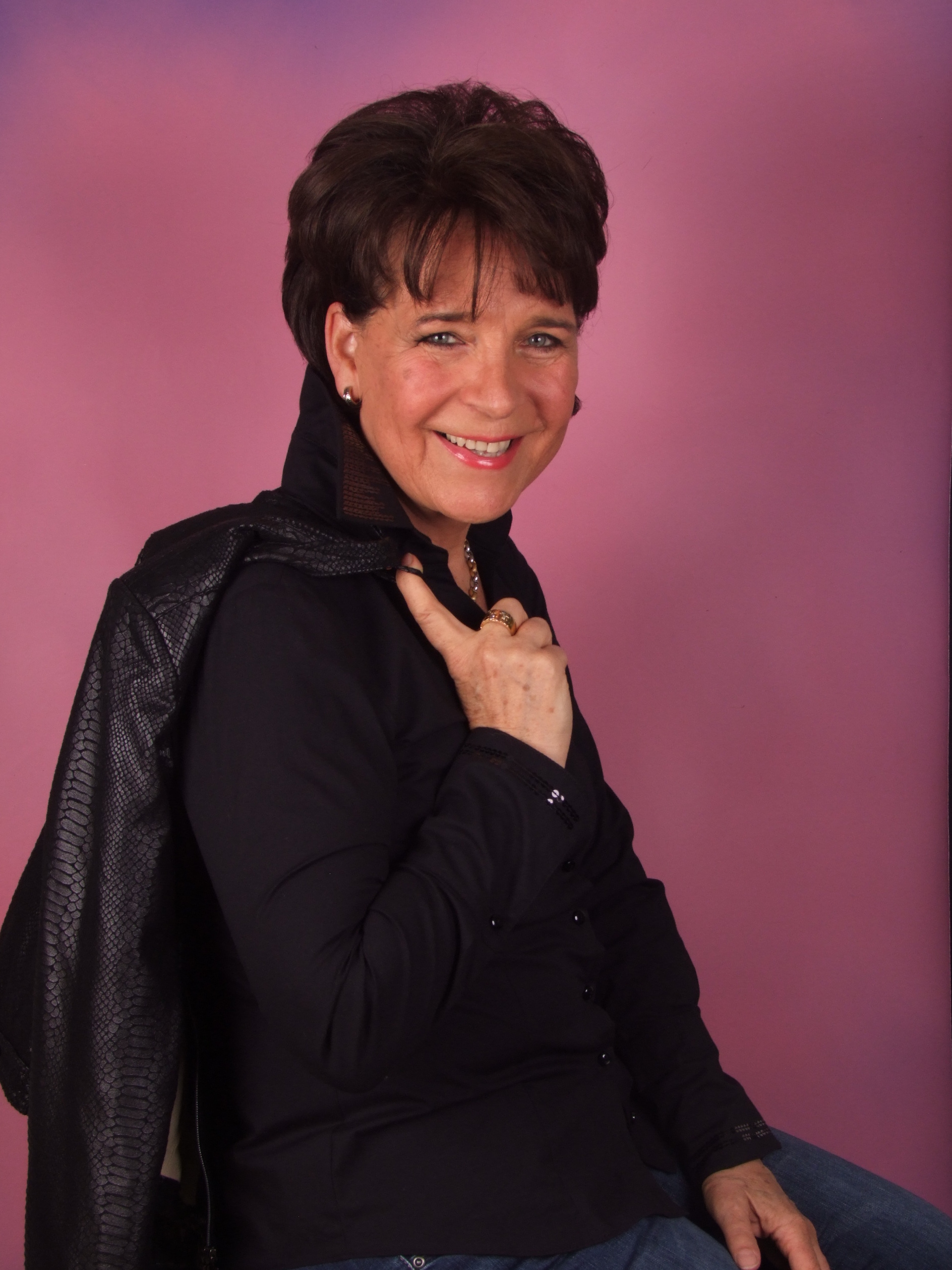 Gerda Steiner im Mai 2017 (Foto: Theater Event GmbH)